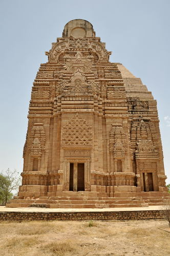 Teli ka mandir fort Gwalior